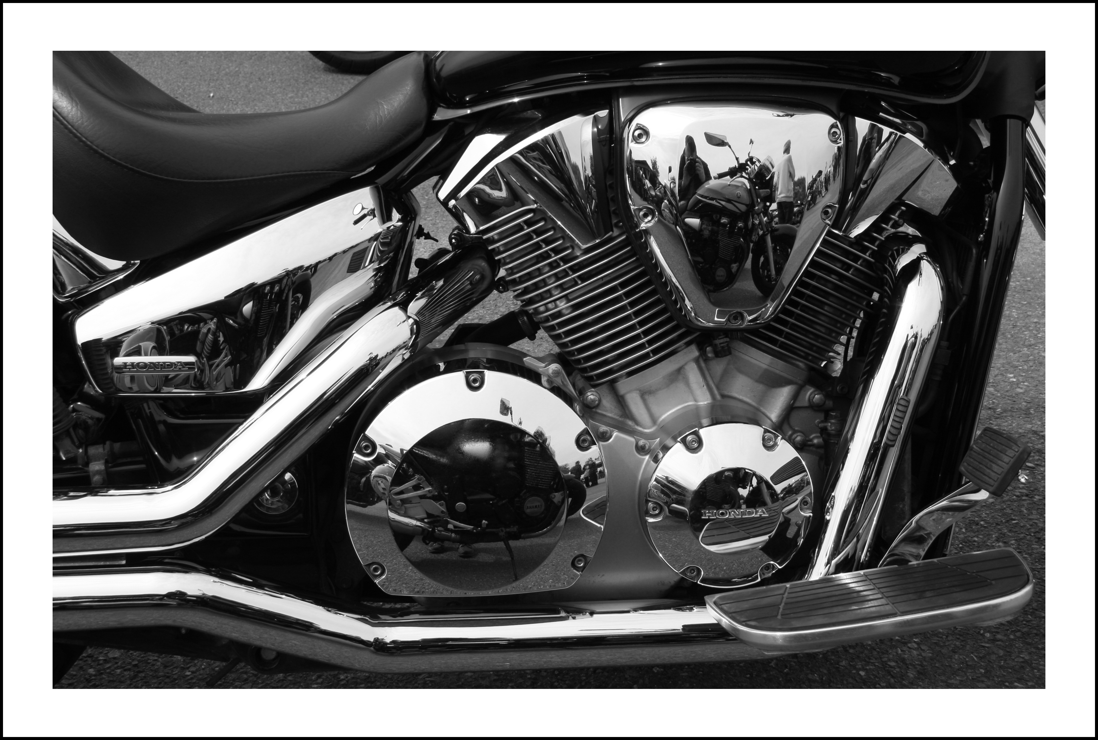 Honda